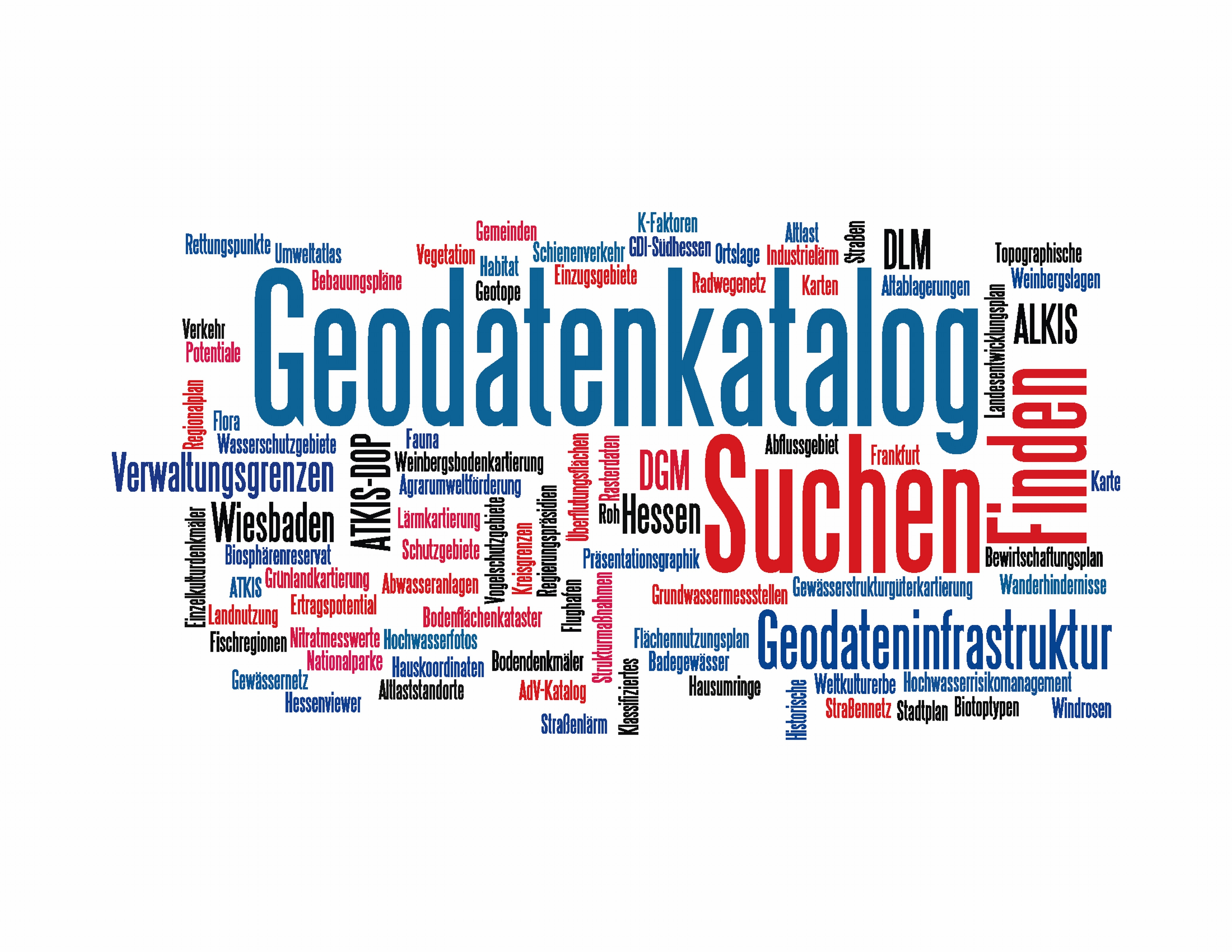 Geodata infrastructure (GDI)